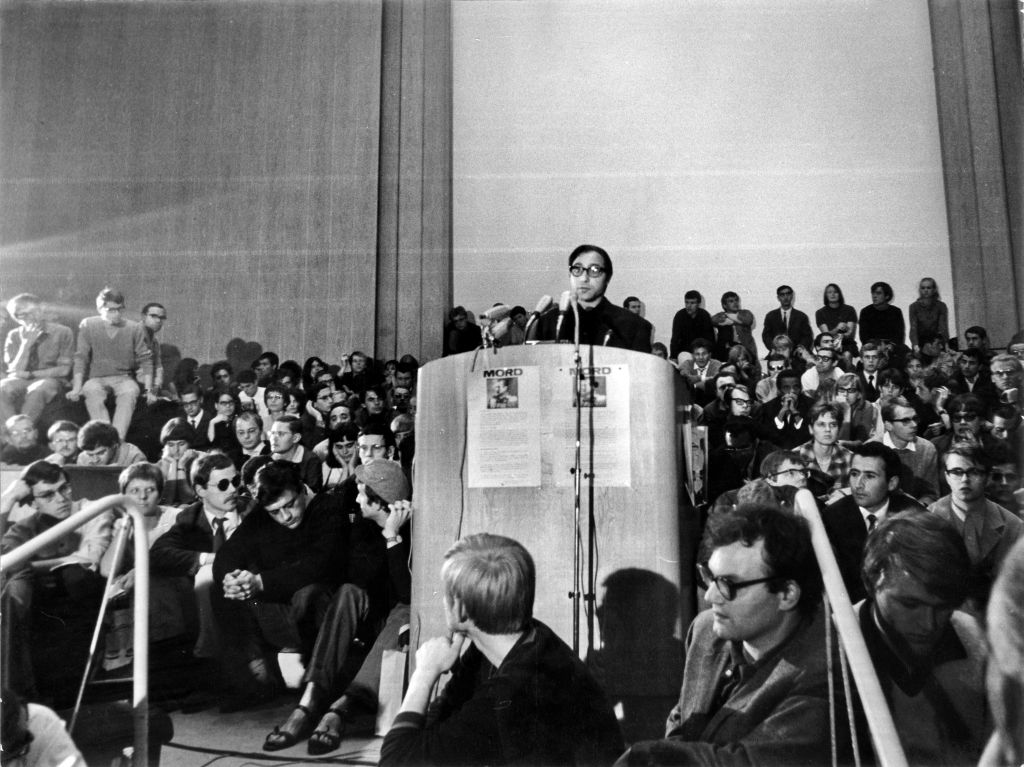 Ludwig Binder: Studentenrevolte 1967/68, West-Berlin; veröffentlicht vom Haus der Geschichte der Bundesrepublik Deutschland